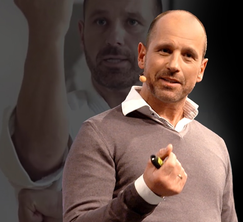 Gantert 2017